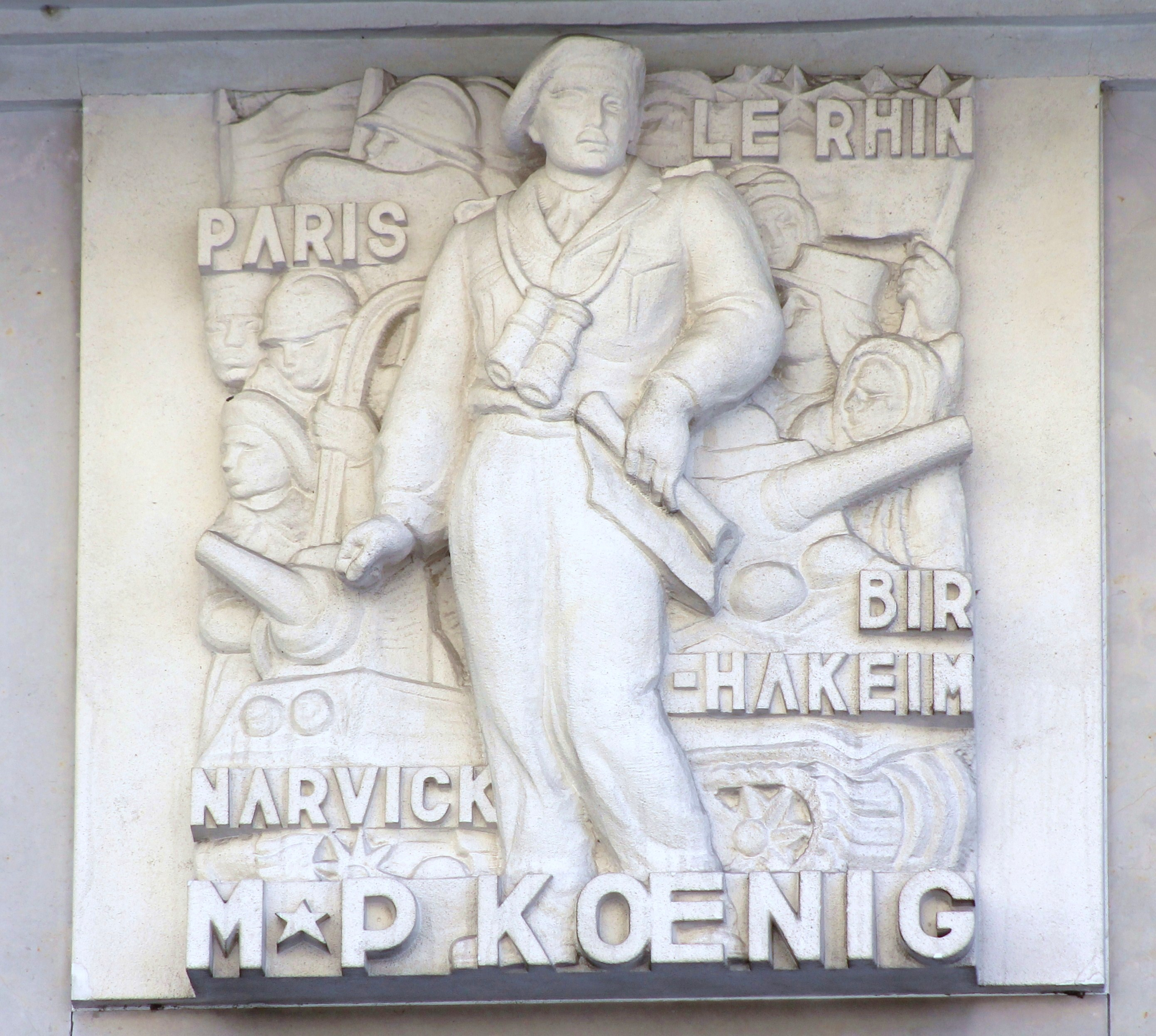 Bas-relief sur la façade de l'hôtel Malherbe à Caen (Calvados). Marie-Pierre Kœnig